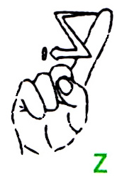 Der Buchstabe Z im deutschen Fingeralphabet, entsprechend einer Infokarte des Landesverbandes Bayern der Gehörlosen e.V. (